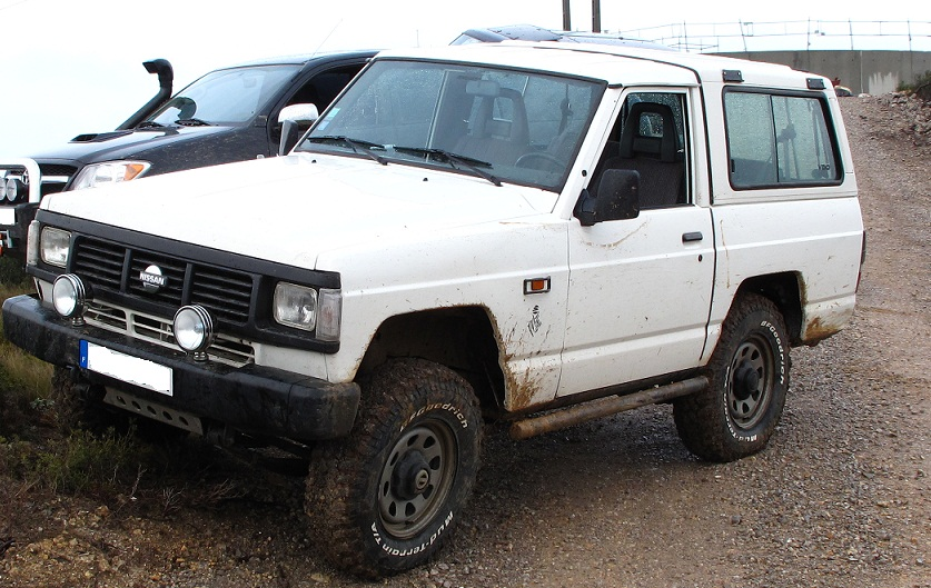 Nissan Patrol Baroud 2.7 Turbo-Diesel